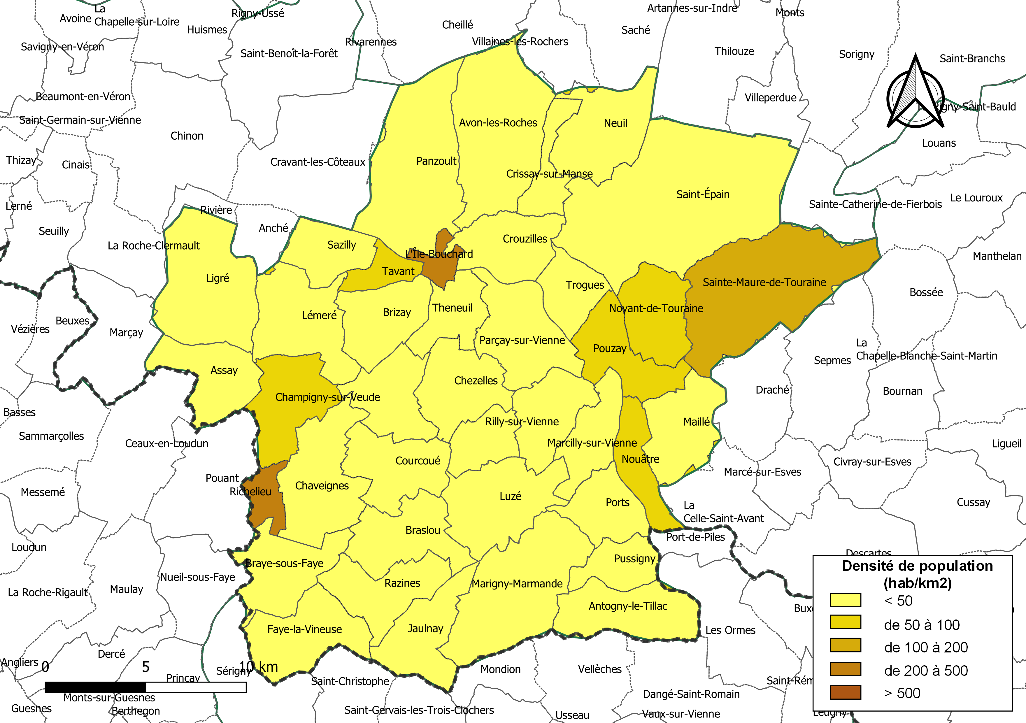 Carte des densités de population (millésimée 2016) des communes de la communauté de communes la Communauté de communes Touraine Val de Vienne, département d'Indre-et-Loire, France. Composition au 1er janvier 2019.